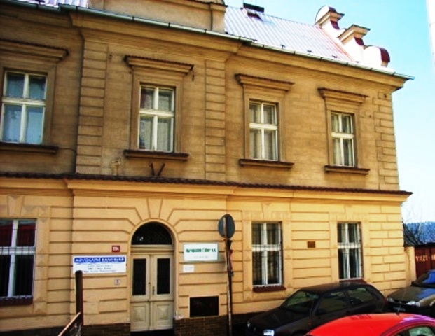 Dům č.704 v Ústecké ul. (u Křižíkova nám.) v Táboře, kde žil JUDr.Emanuel Chalupný